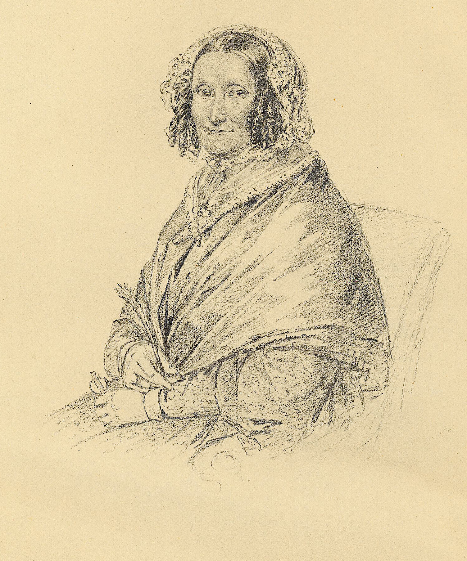 Sara Wacklin (1790-1846)